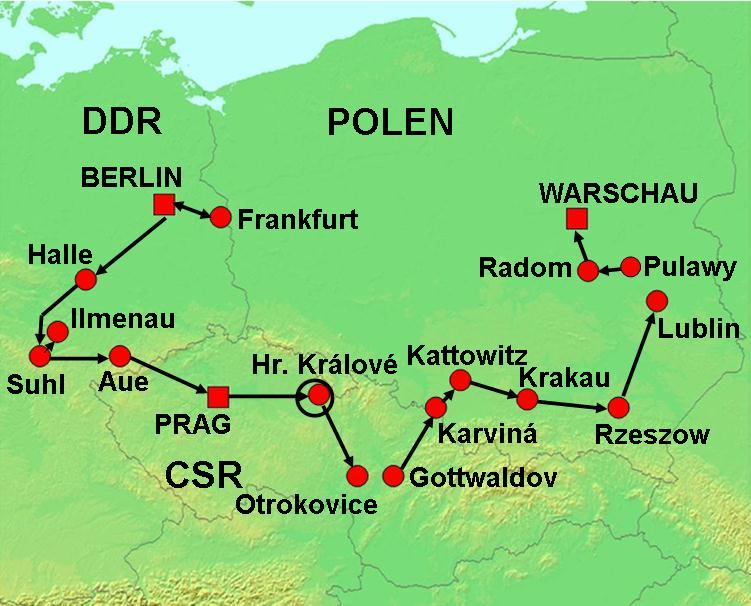 Internationale Friedensfahrt 1968, Streckenverlauf